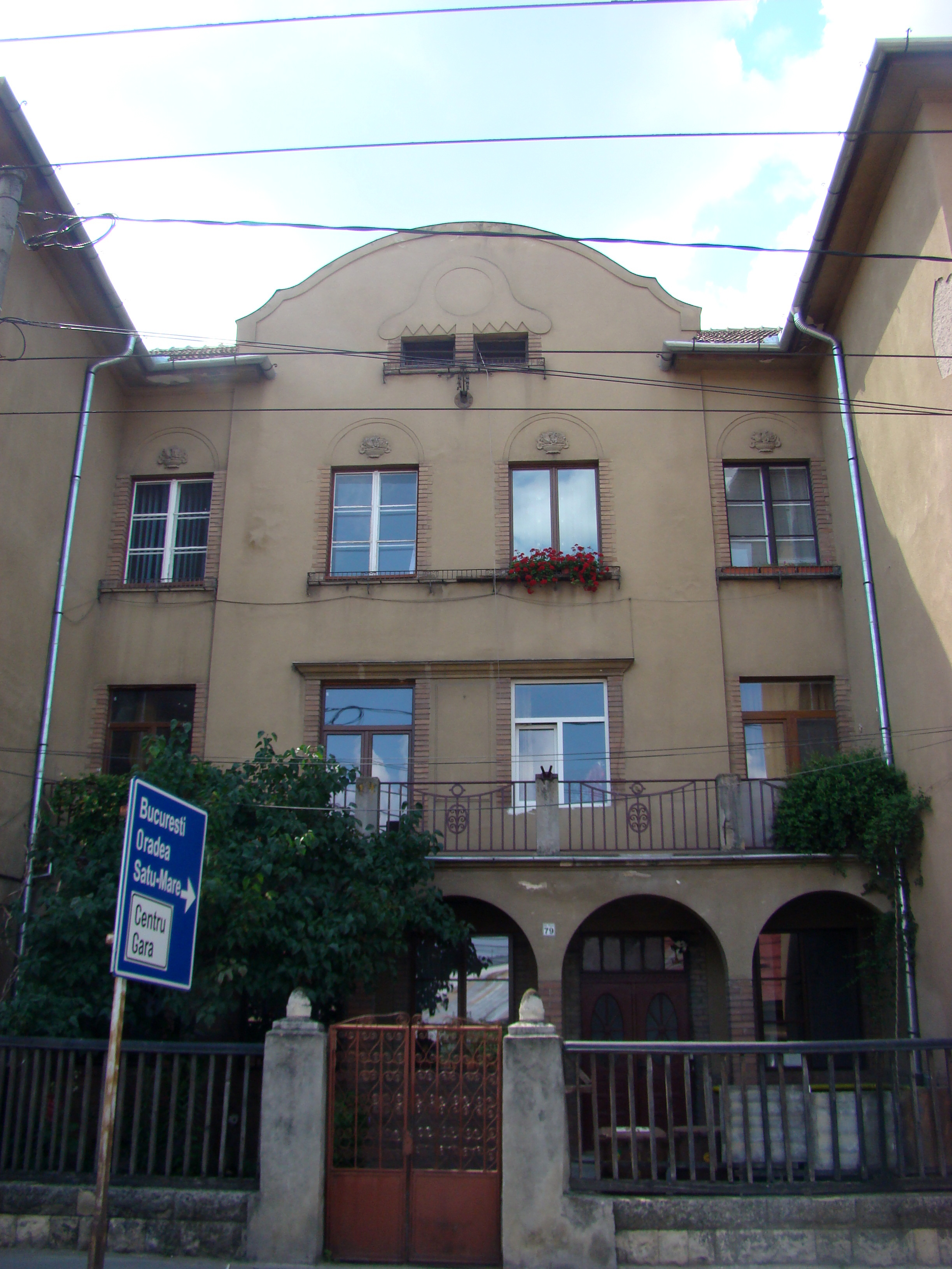 Clădire monument istoric, str. Paris, nr.79